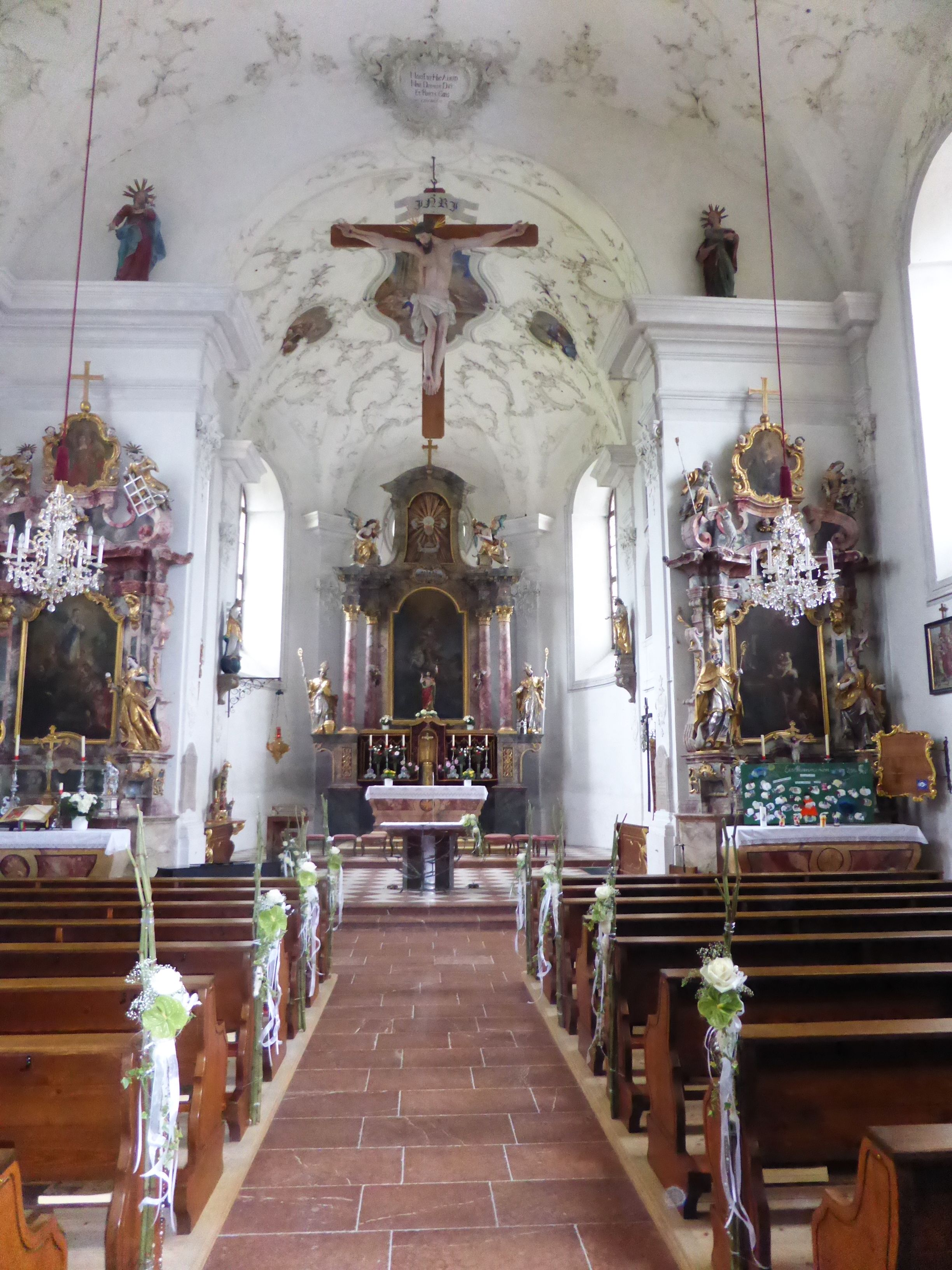 Kath. Pfarrkirche hl. Georg, Stuck von Benedikt Zöpf (1754)